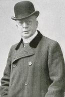 Die Hauptdarsteller des Berliner Lessing-Theaters unter der Direktion von Otto Brahm.